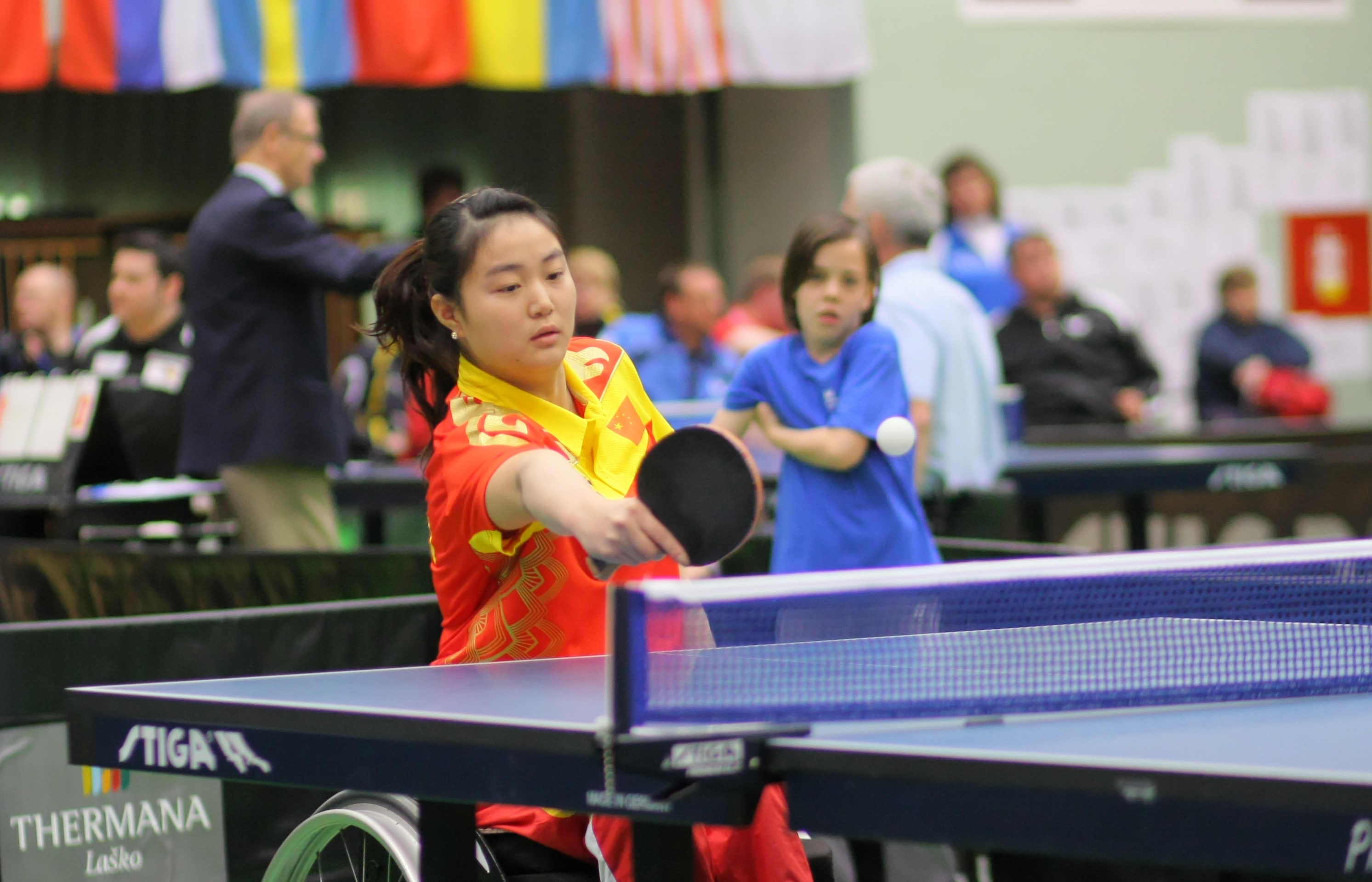 IMG_9140_dxo